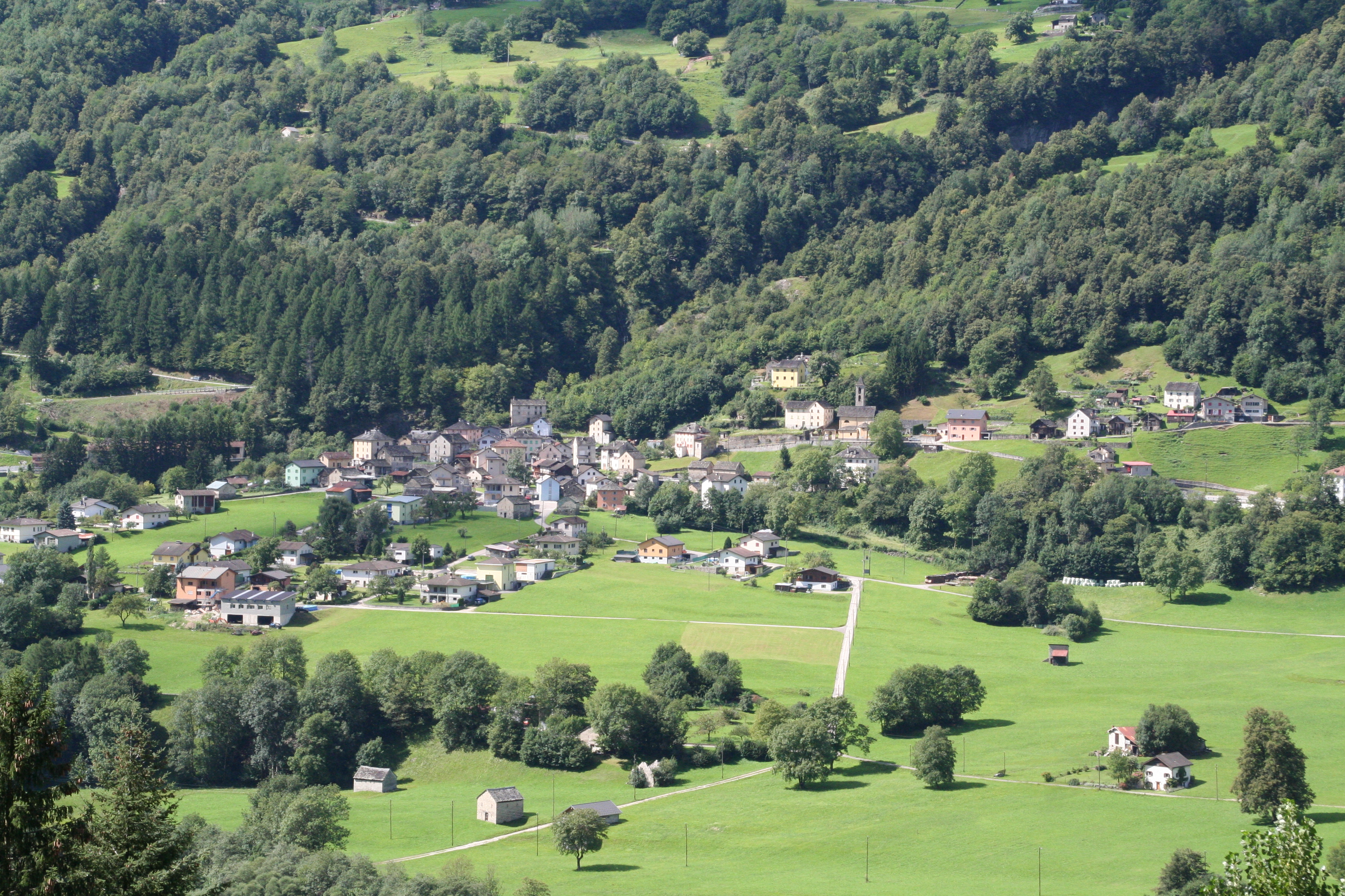 Vista di Prugiasco, frazione di Acquarossa